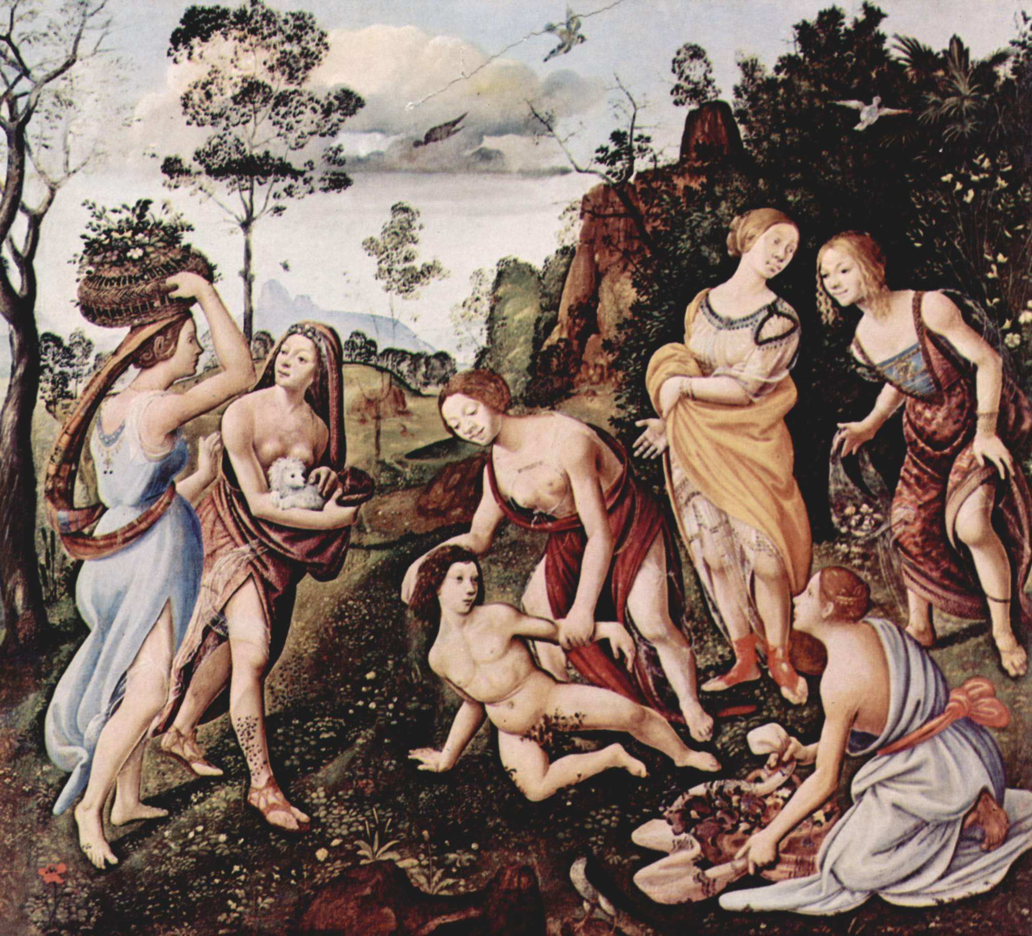 Bildfolge zur Frühgeschichte der Menschheit